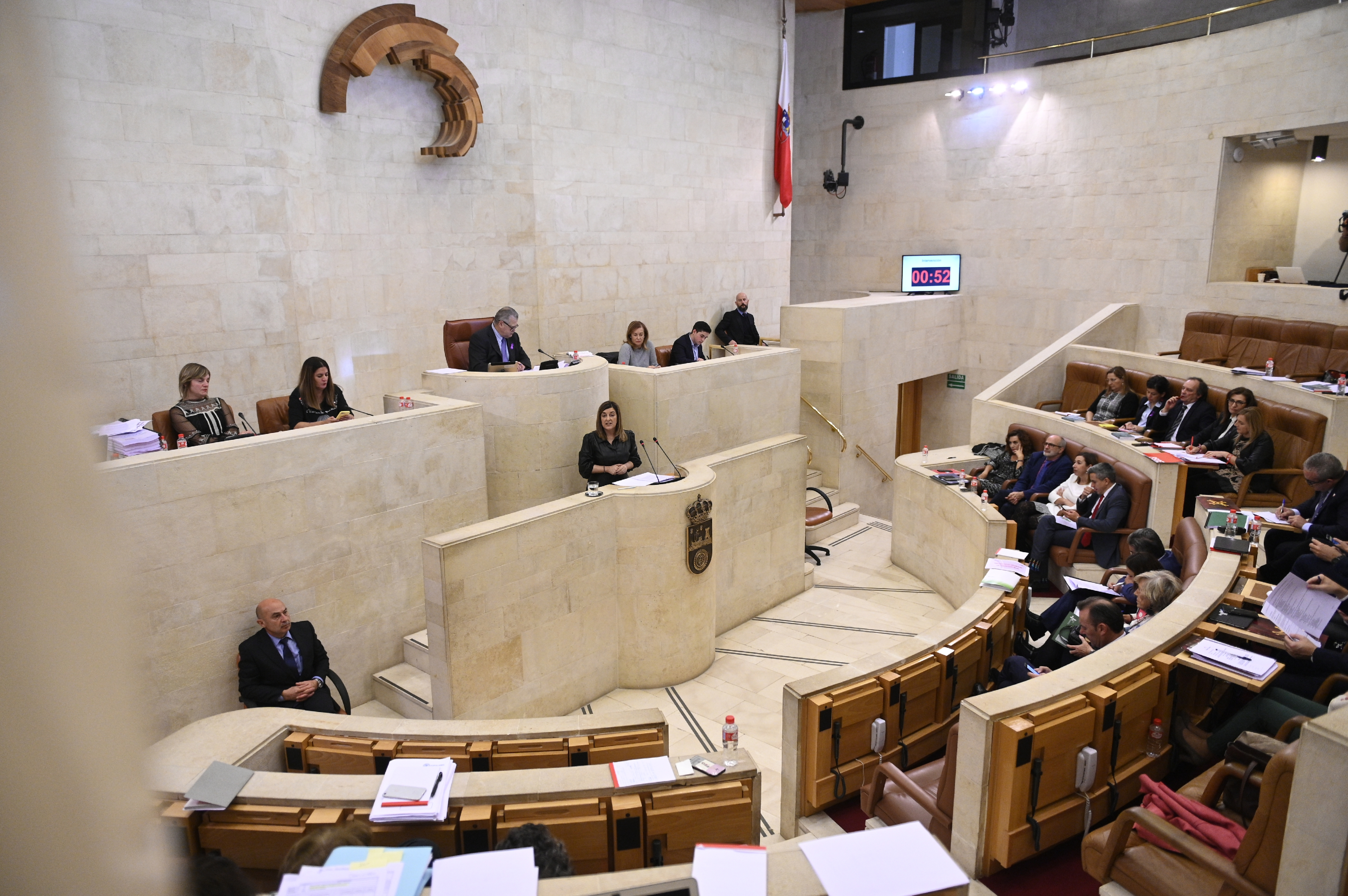 26/11/2019.- Intervención de María José Sáenz de Buruaga en el Debate de la enmienda a la totalidad del Proyecto de Ley de Presupuesto de Cantabria para 2020